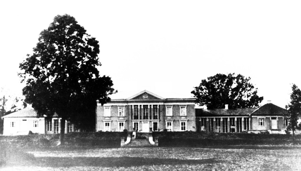 Беларуская (тарашкевіца): Паланэчка (Pałanečka), палац Радзівілаў (Radzivił)